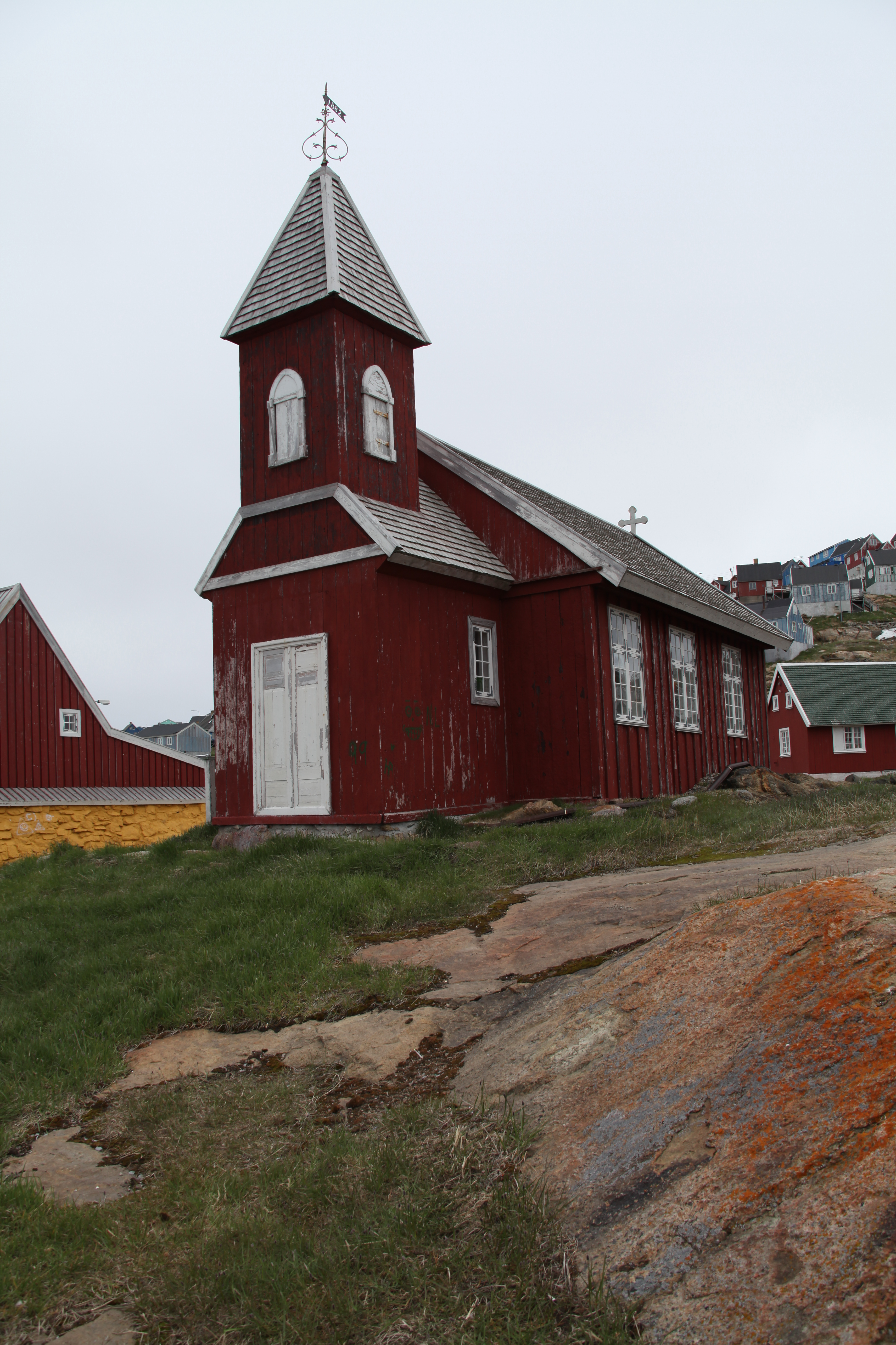 Upernavik Museum